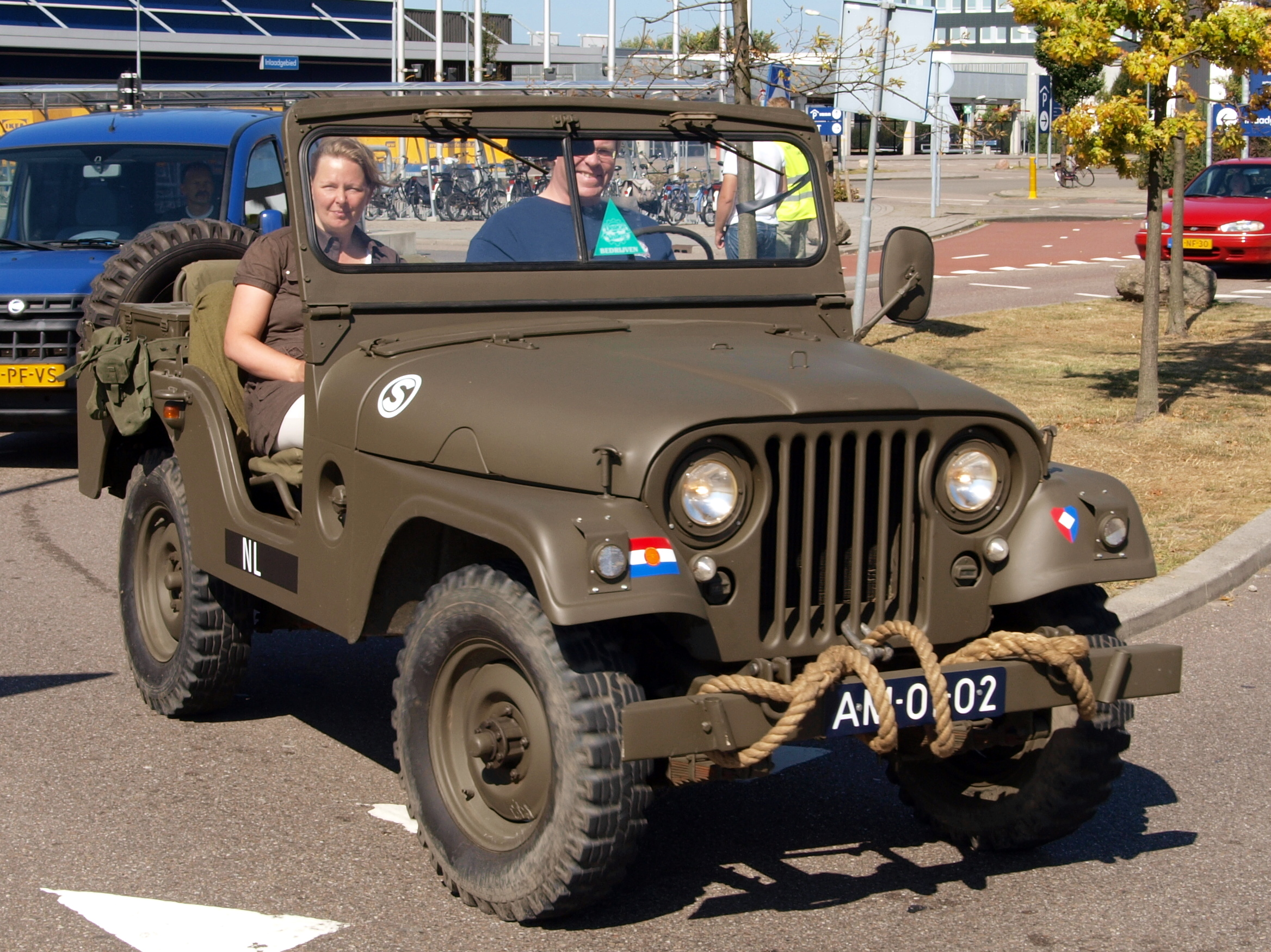 NEKAF M38A1 AM-01-02